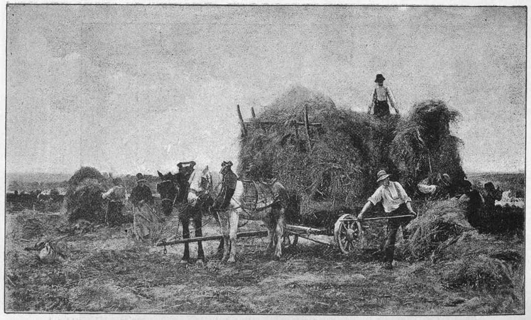 Bei der Heuernte